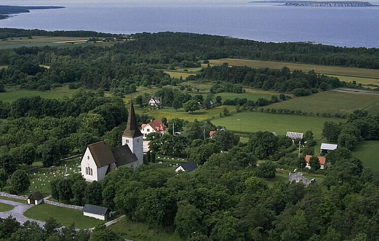 Motiv: Fröjels kyrka Nyckelord: Flygbilder, Riksintressen Kategori: KyrkomiljöFröjels kyrka